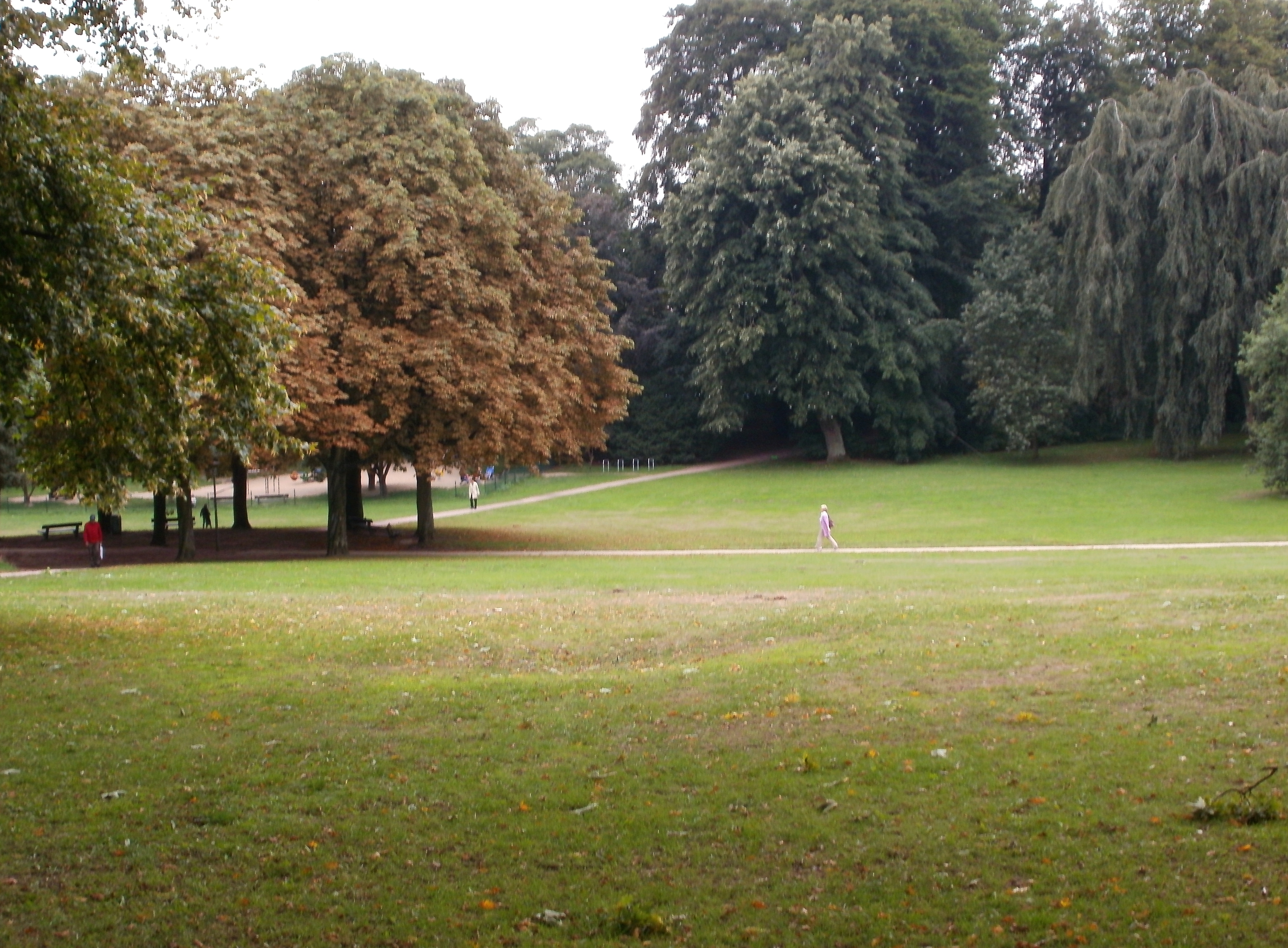 Parklandschaft Hessepark in Hamburg-Blankenese